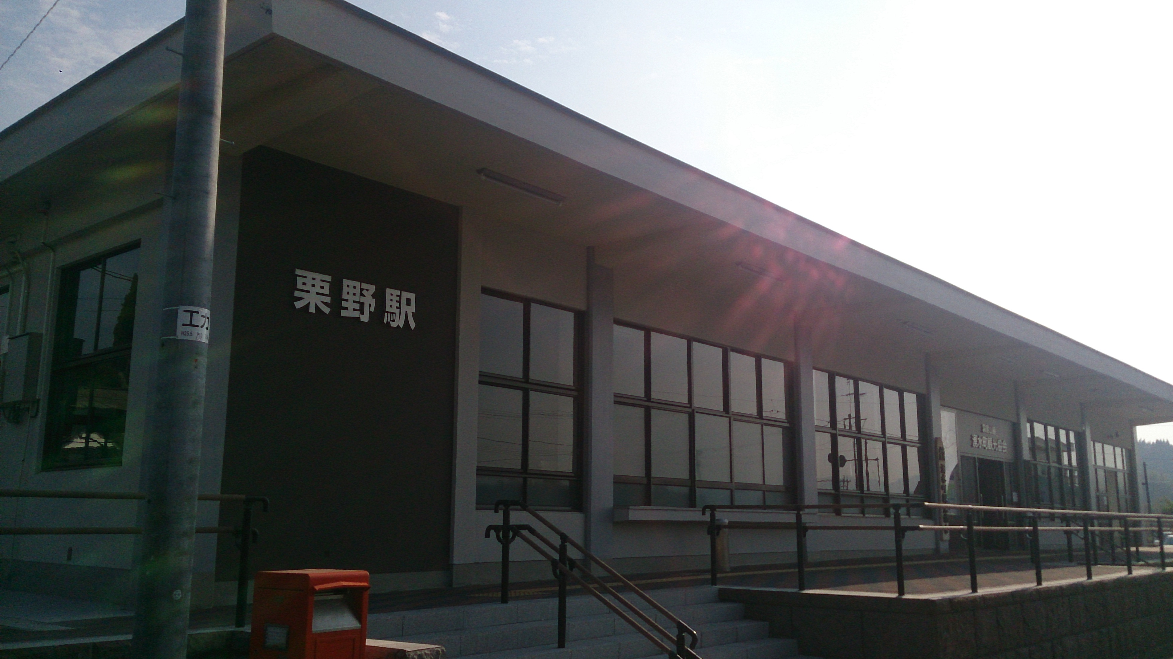 kurino Station